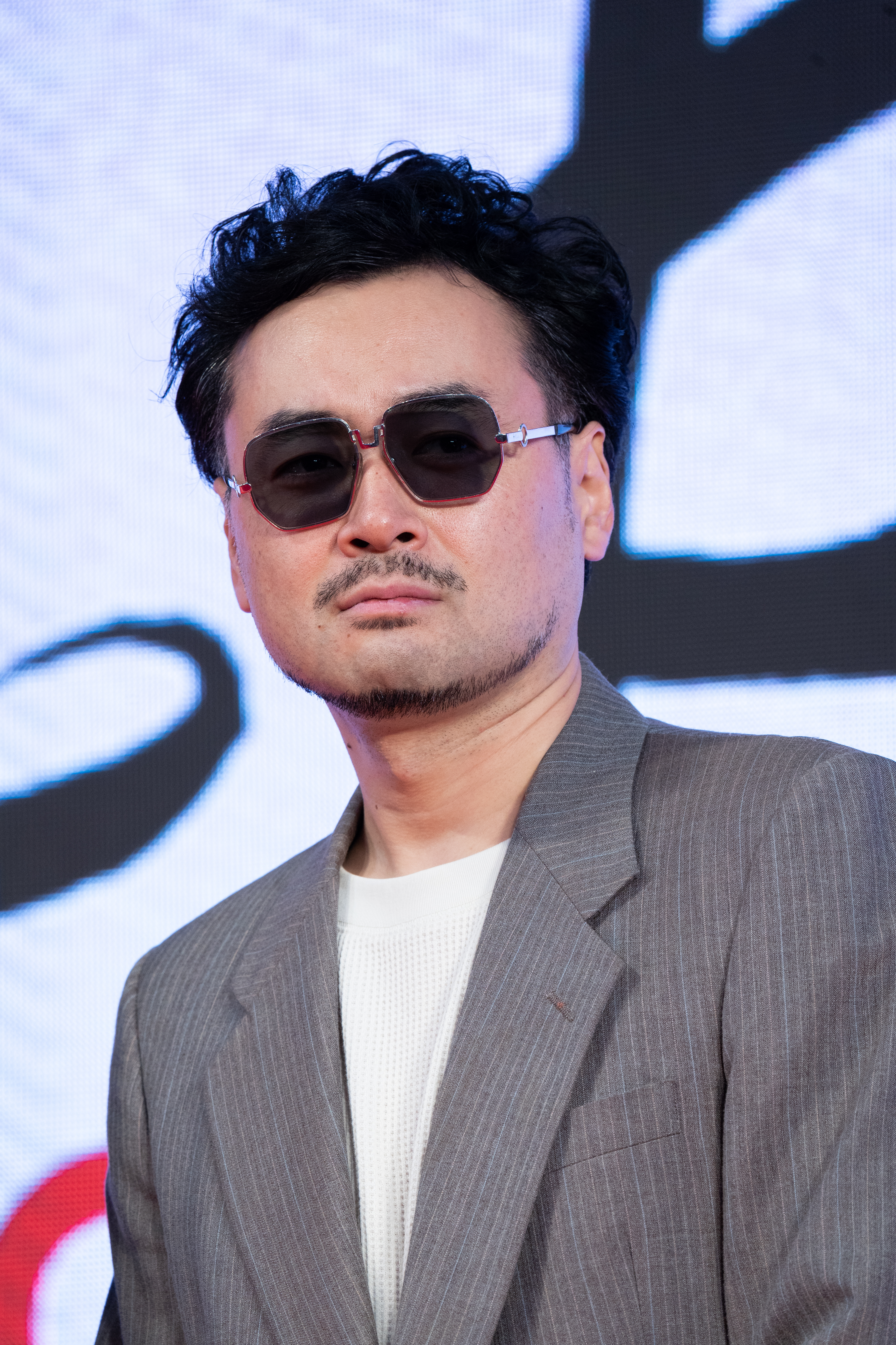 第32回 東京国際映画祭 オープニングセレモニー 前野健太 (猿楽町で会いましょう)